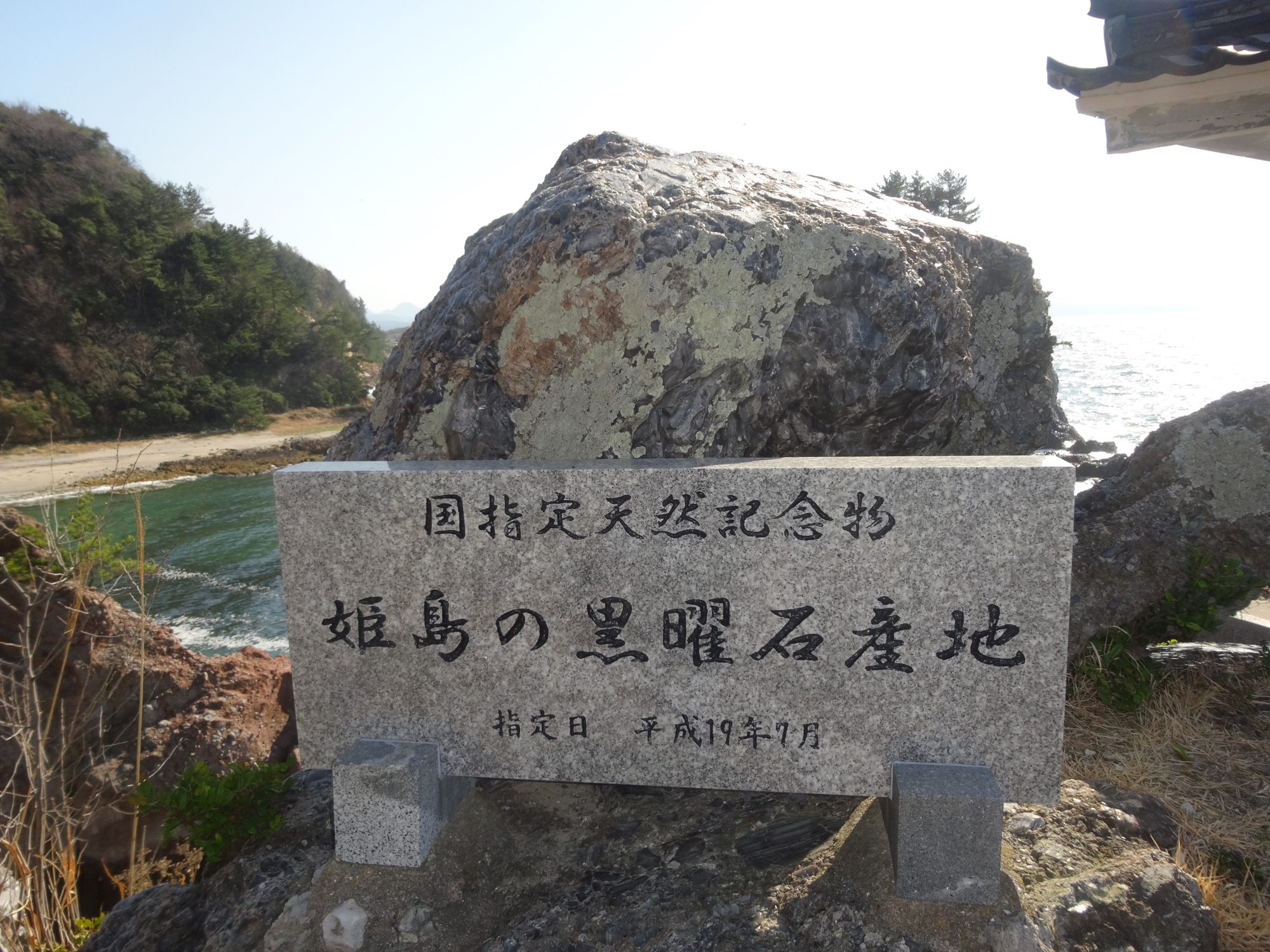 姫島の黒曜石産地の記念碑